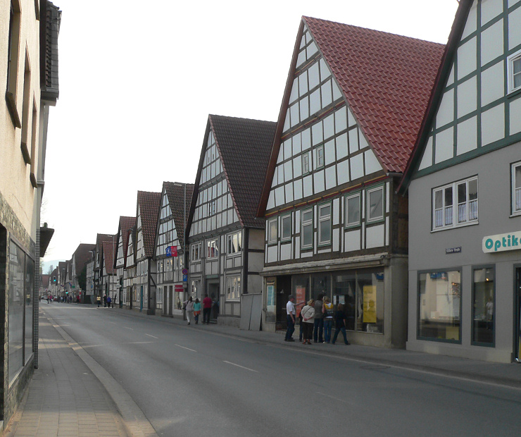 Innenstadt Lügde